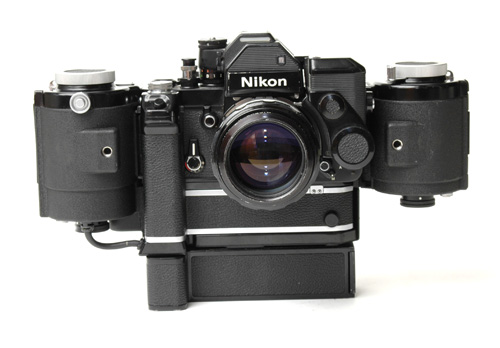 Nikon F2 + DS1 + Moteur MD2 et Dos 250